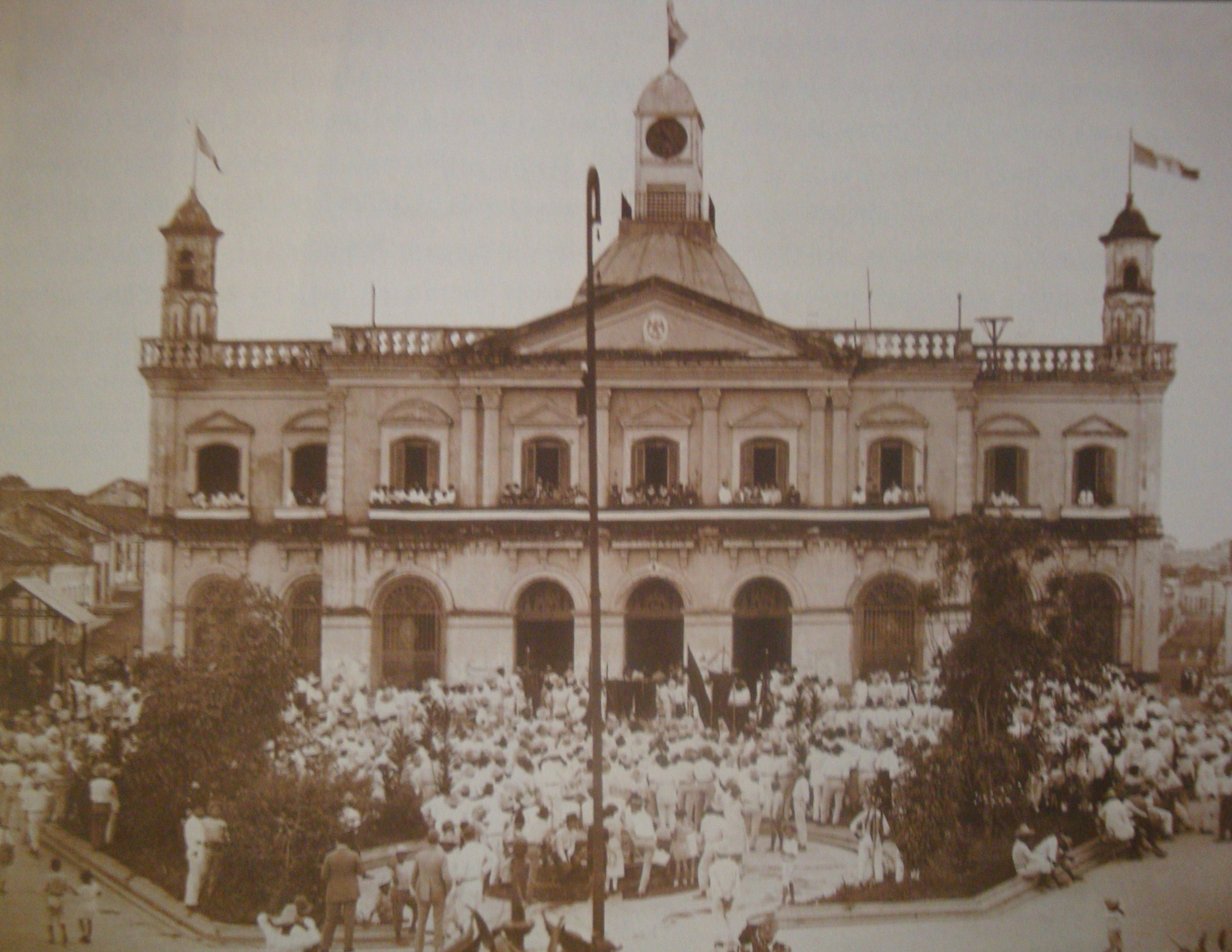 El Palacio de Gobierno de Tabasco a principios del siglo XX. Villahermosa, Tabasco, México.